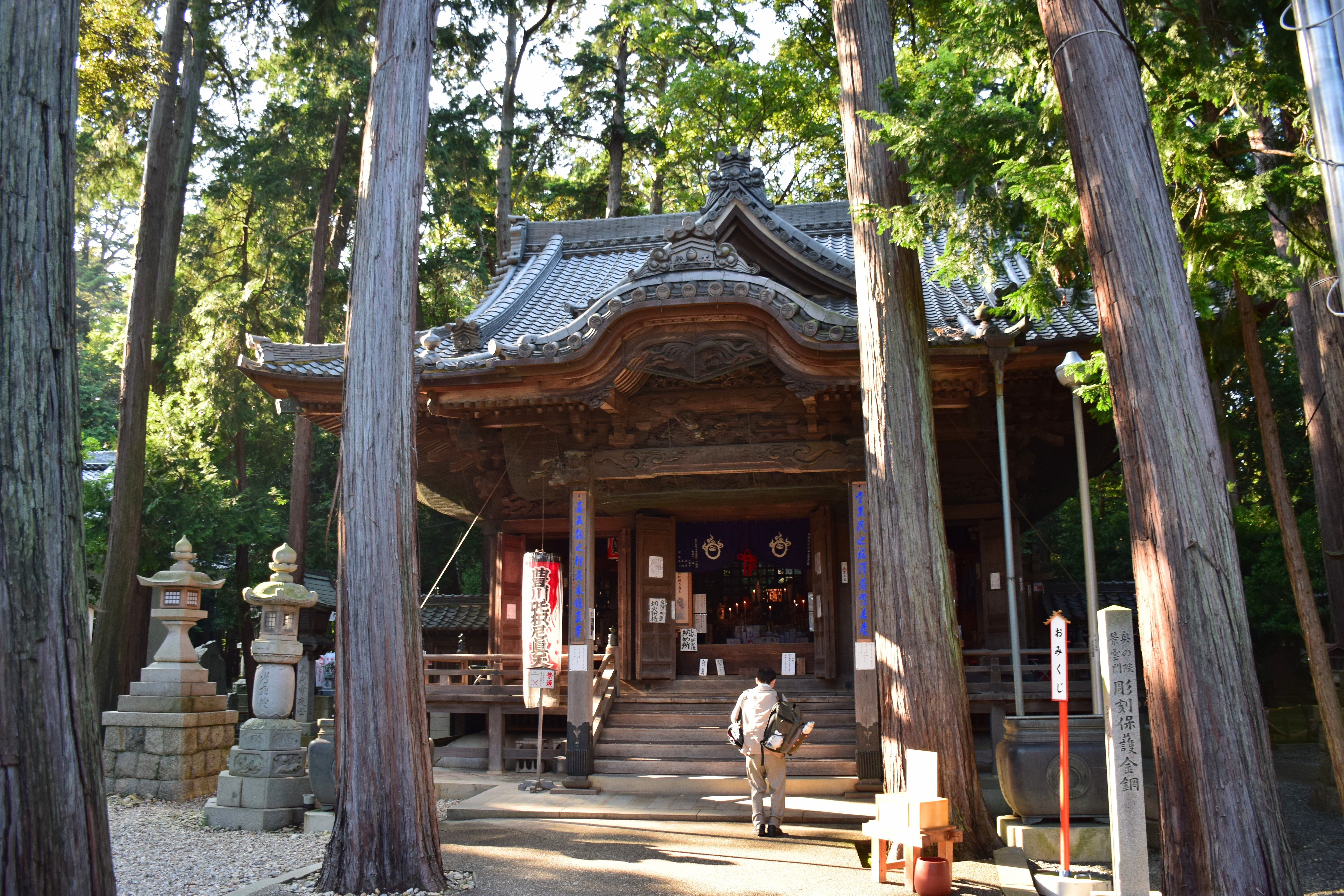 豊川稲荷奥の院